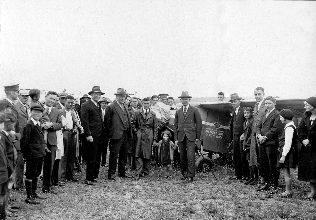 Digital restored version.